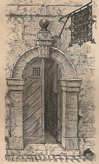 Saltmätarehärbärget Skärgårdsgatan15 Stockholm